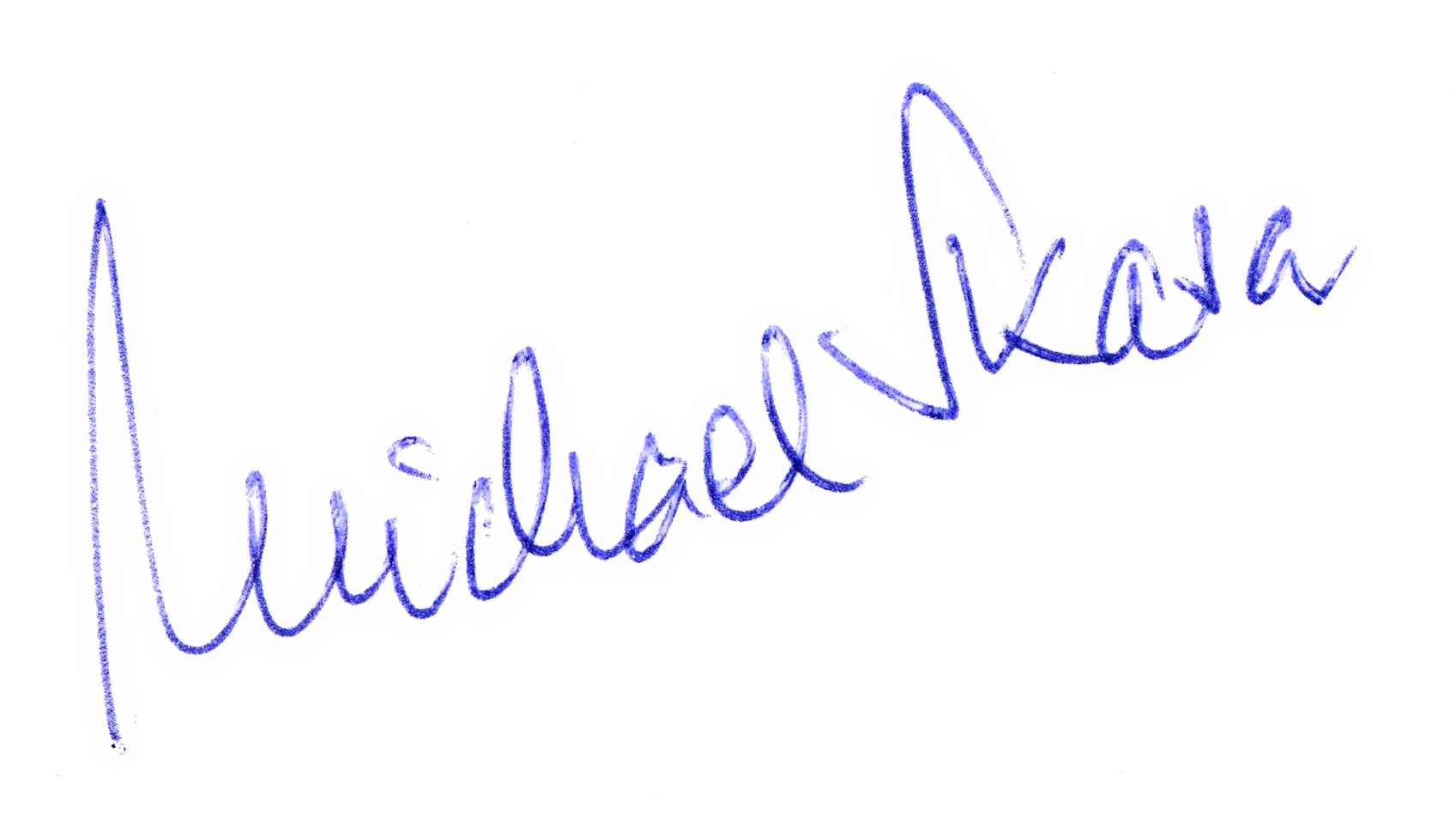 Autogramm des Radiomoderators Michael Skasa